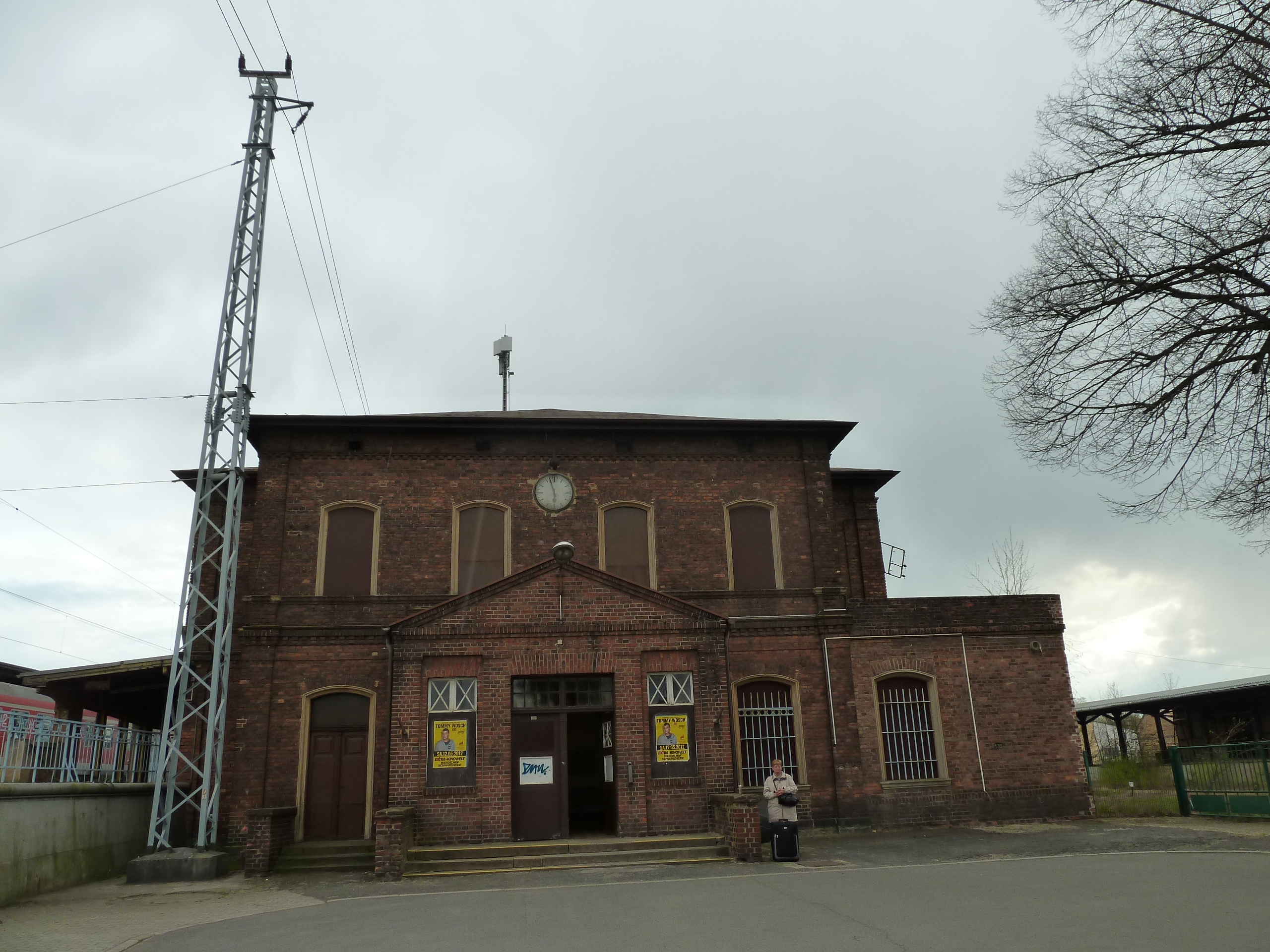 Bahnhof Ruhland, Straßenseite